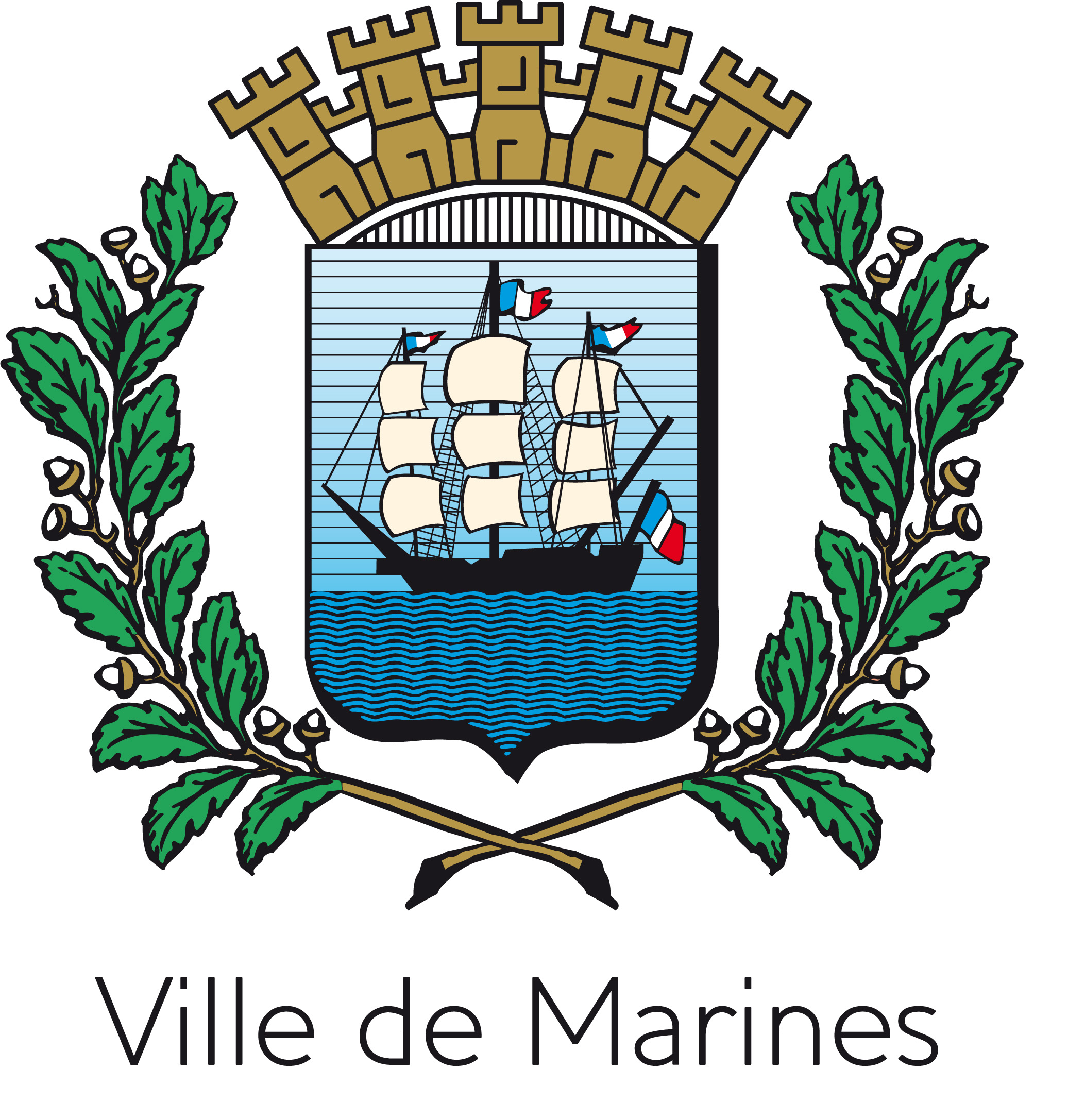 Blason de Marines